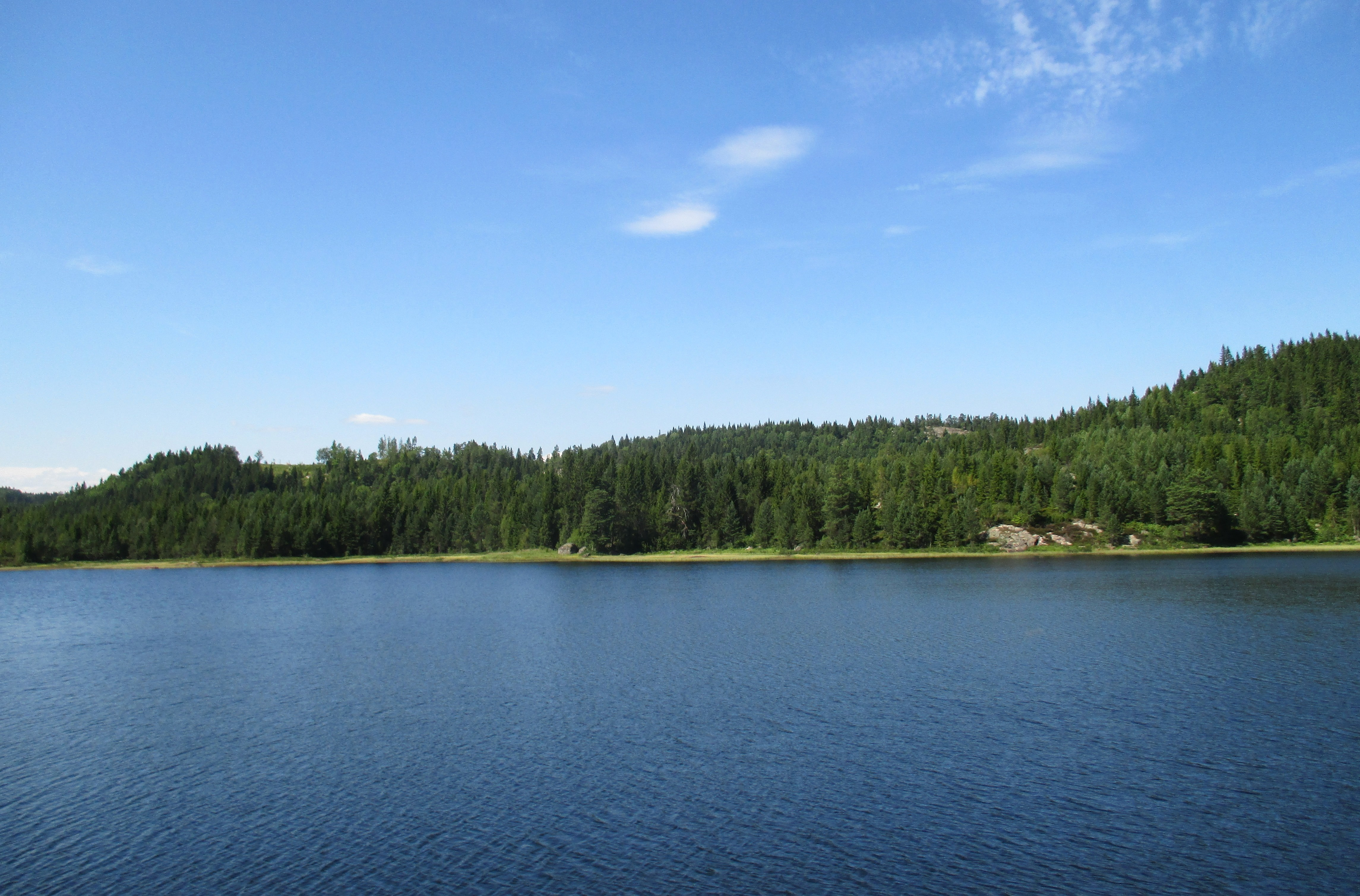 Hundlandsvannet, på grensen mellom Grimstad og Birkenes